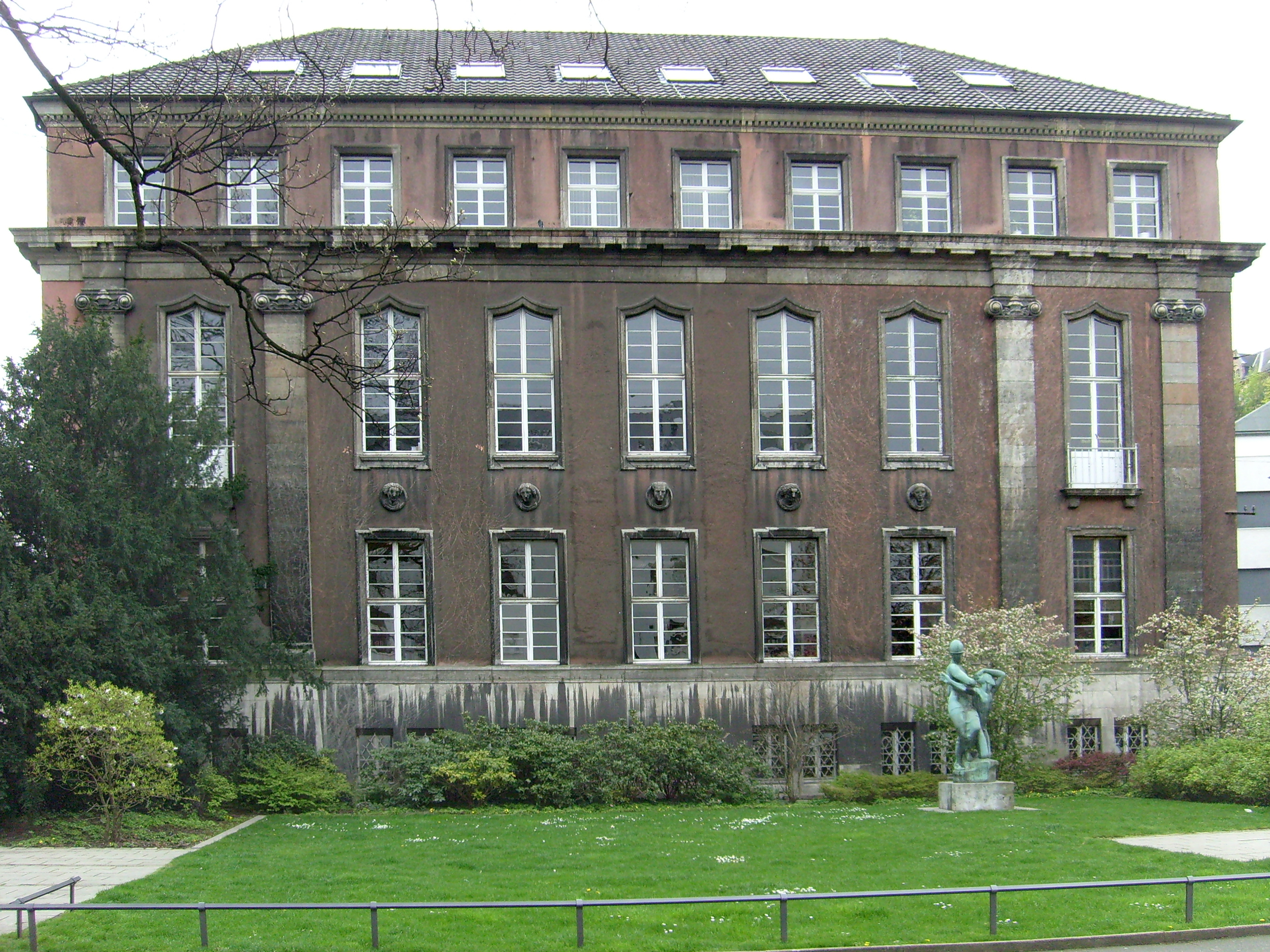 Kasinogarten Wuppertal mit Bellona-Skulptur von Georg Kolbe vor dem Gebäude der Stadtbibliothek Wuppertal